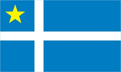 Bandeira de Santa Helena